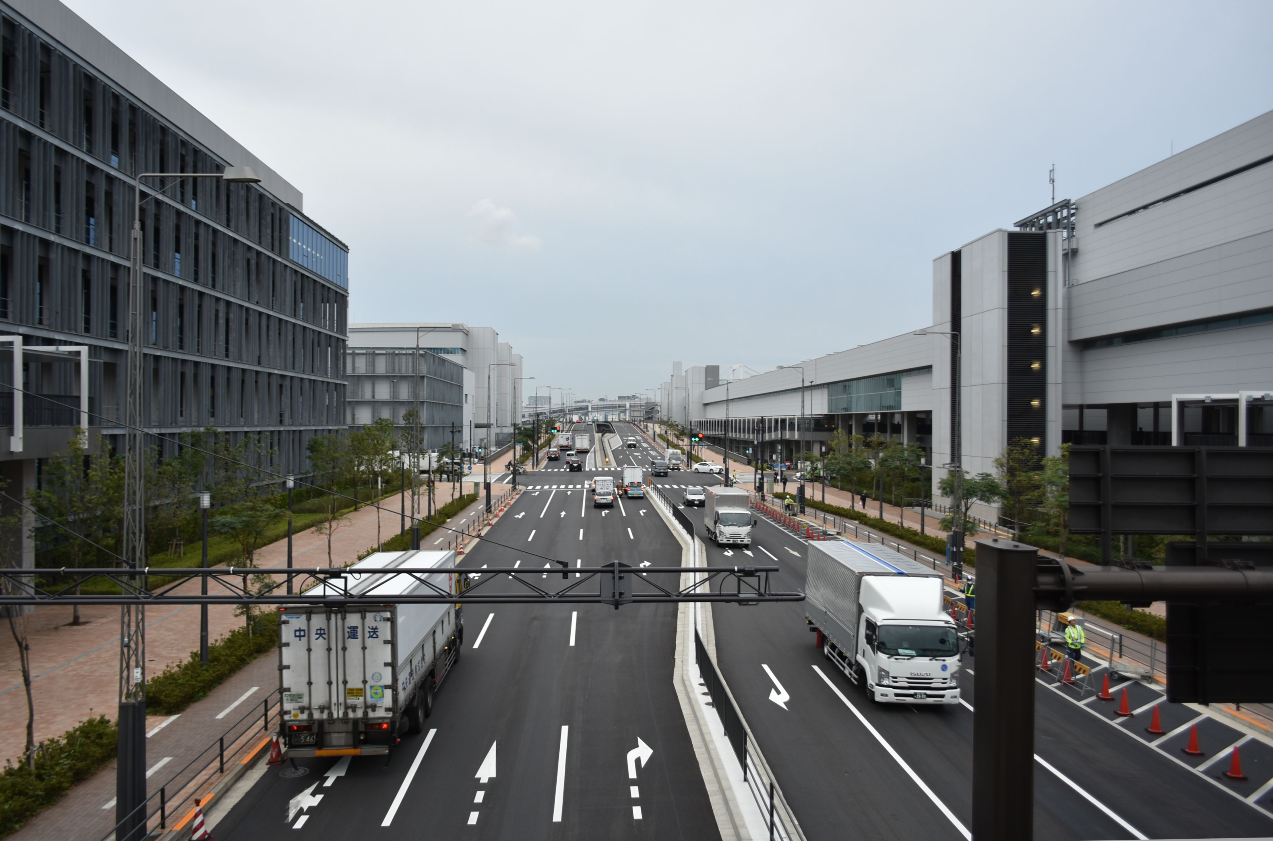 豊洲市場 都道484号線 左神る施設棟 右6街区水産仲卸売場棟